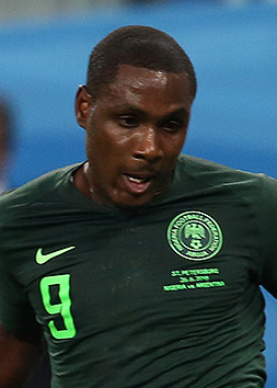 Гол Рохо в концовке выводит Аргентину в плей-офф чемпионата мира